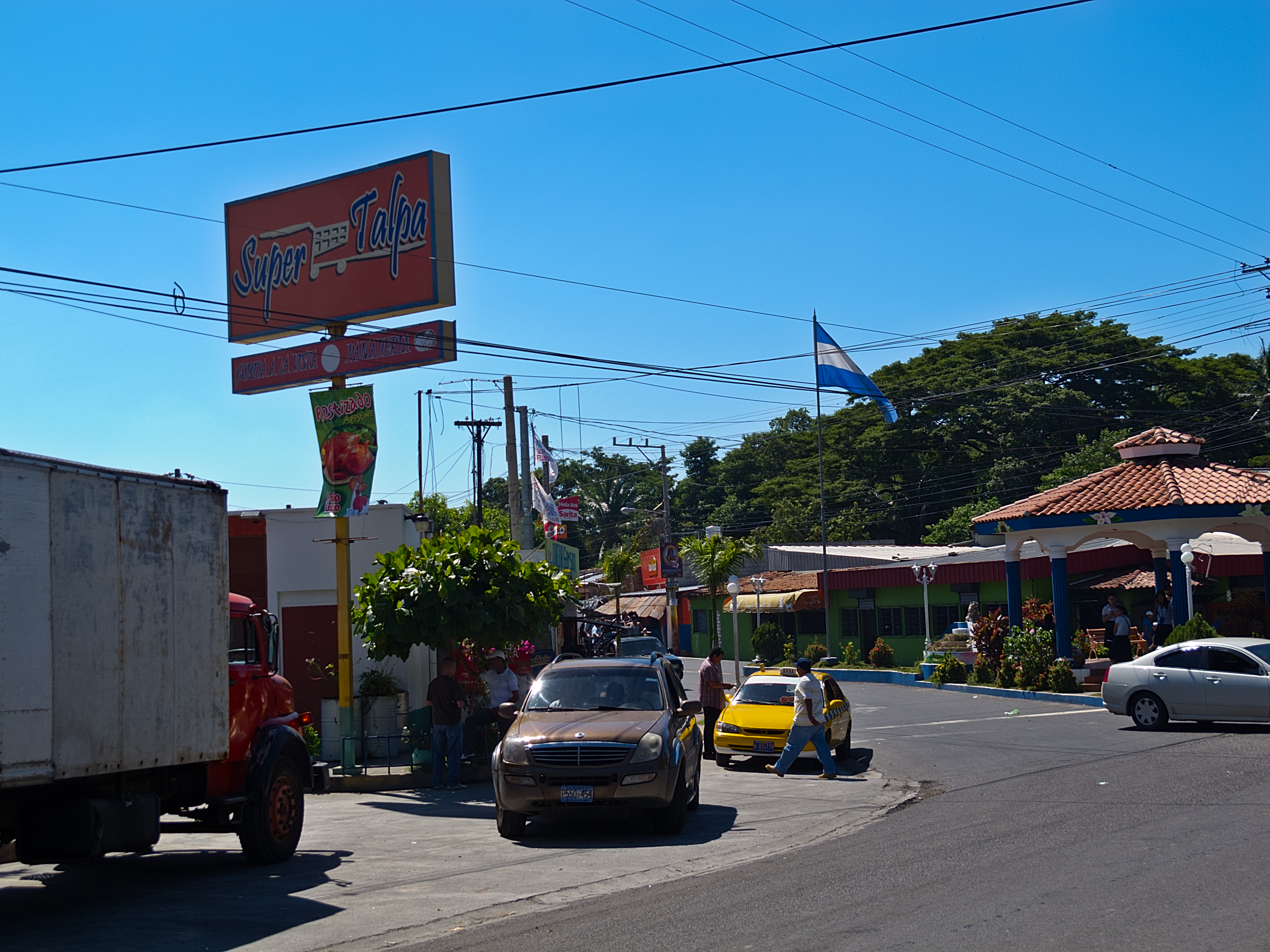 Entrada de San Luis Talpa, La Paz, El Salvador, desde la carretera litoral.